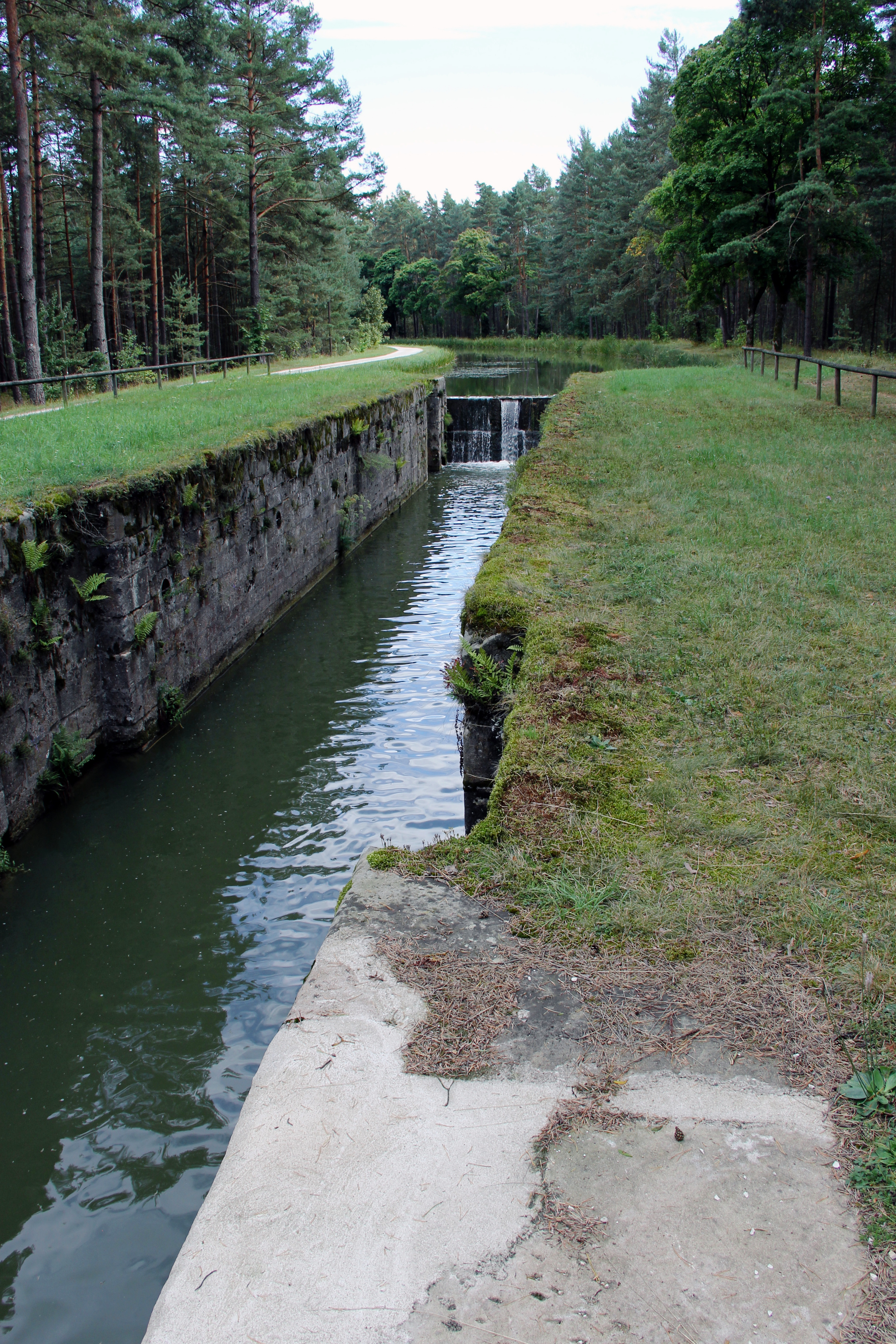 Schleuse 50, Ludwig-Donau-Main-Kanal